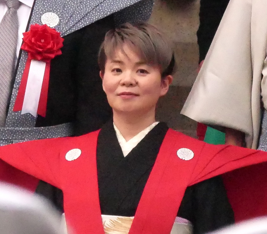 島津亜矢、成田山新勝寺にて (Aya Shimazu at Narita-san Shinshō-ji)